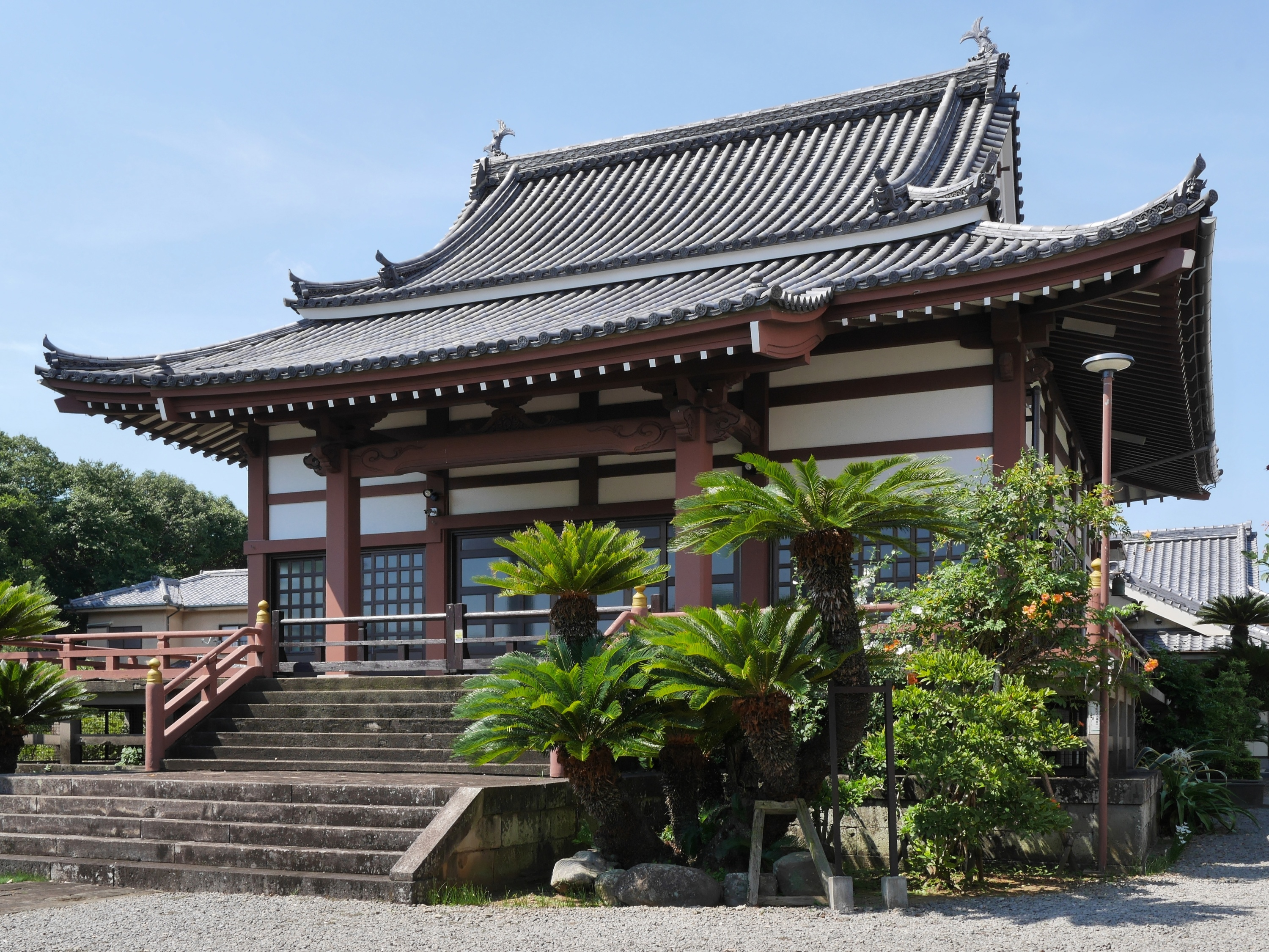 悟真寺の本堂（長崎県長崎市）。